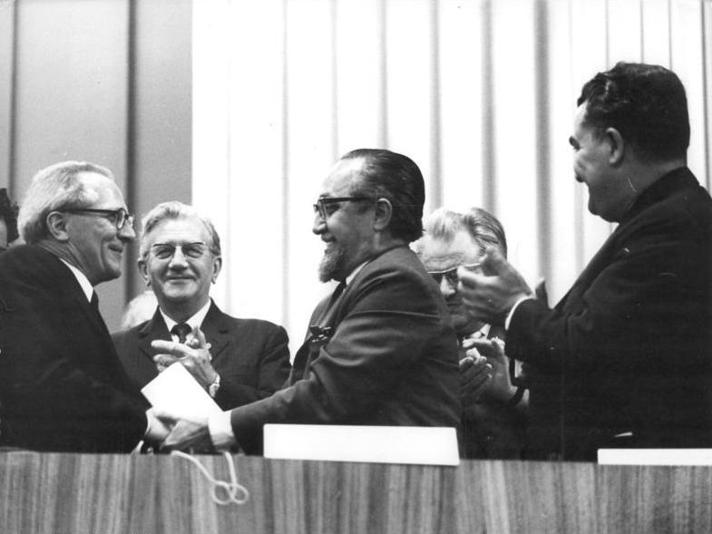 ADN-ZB Kollektiv 16-6-71-ba Berlin: VIII. Parteitag der SED-Erich Honecker, Erster Sekretär des ZK der SED, dankt Carlos Rafael Rodriguez, Mitglied des Sekretariats des ZK der KP Kubas, für seine Begrüßungsansprache, mit der sich der kubanische Gast heute (16.6.) an die Delegierten und Gäste wandte; rechts Paul Niculescu-Mizil, Mitglied des Ständigen Präsidiums des Exekutivkomitees und Sekretär des ZK der BKP; 2.v.l. Bernhard Quandt, Mitglied des ZK der SED, 1. Sekretär der Bezirksleitung der SED Schwerin. (Rep.: Koard) (VIII-B)